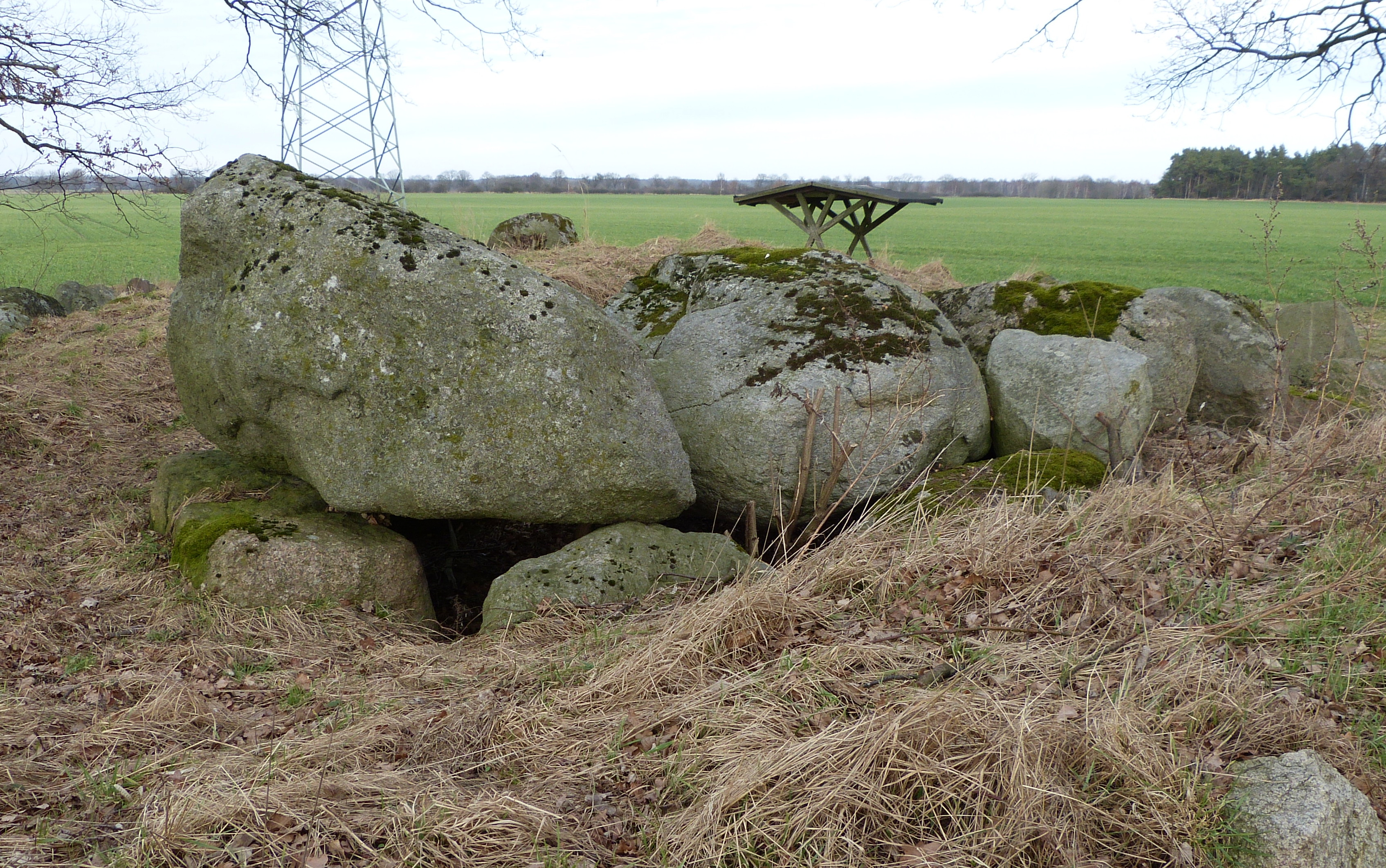 Großsteingrab Kruckow 1, Ansicht des querliegenden Großdolmens von Südwesten